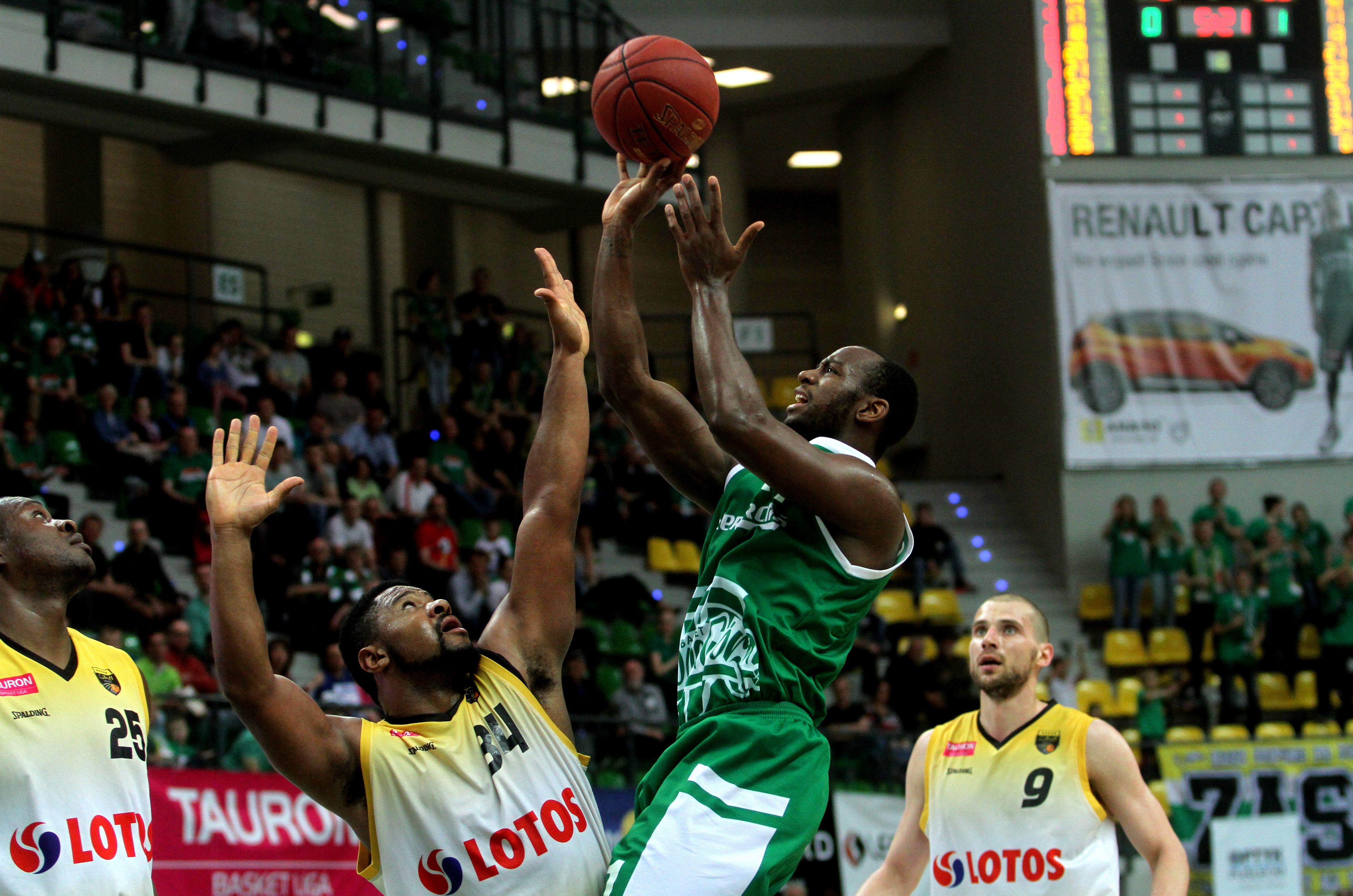 Marcus Ginyard Stelmet Zielona Góra